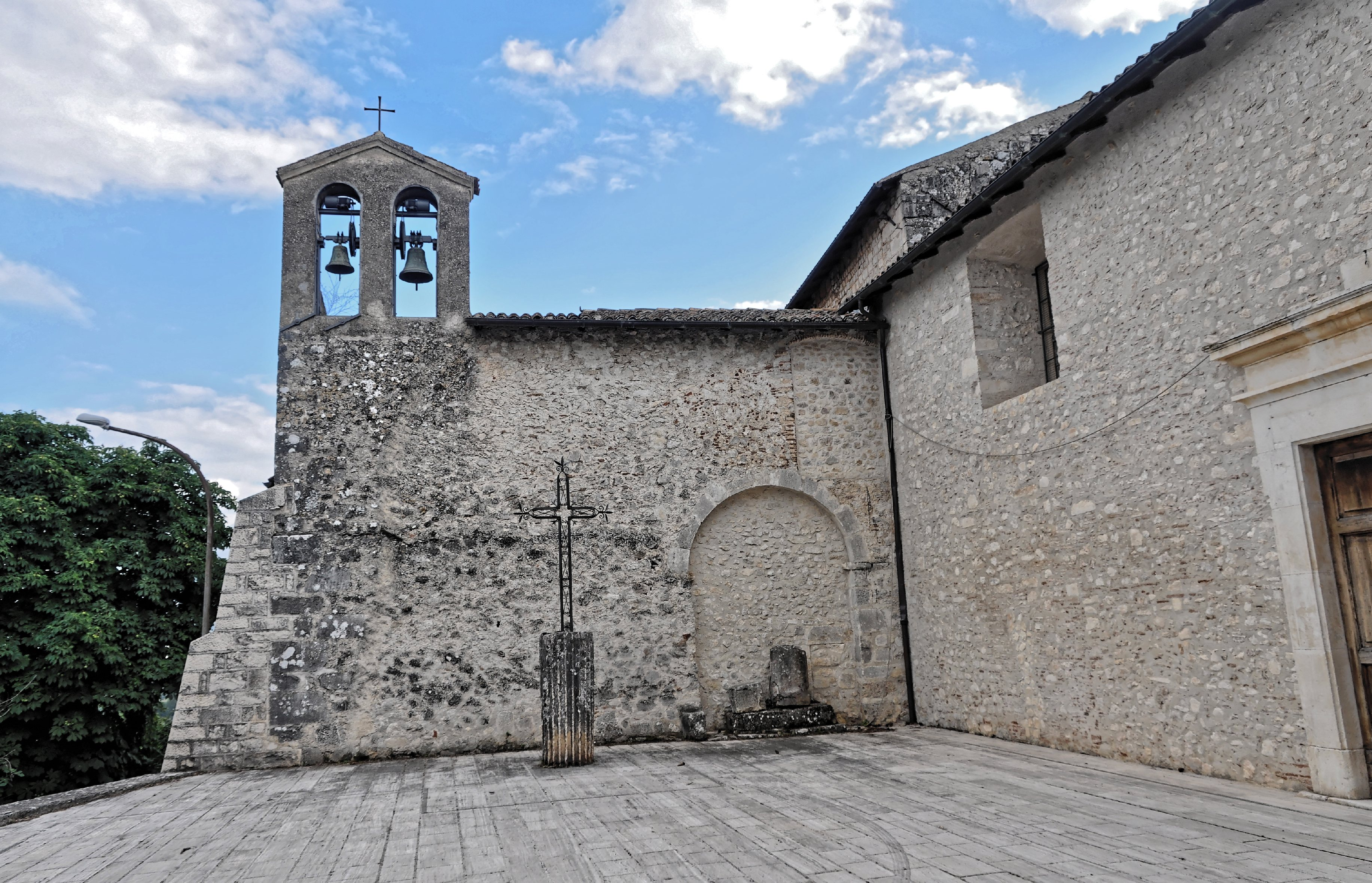 Amiternum 2013 Dieses Foto entstand in Zusammenarbeit mit Stadtbesichtigungen.de Die Seiten Stadtbesichtigungen.de, der dazugehörige Reise Blog sowie die Facebookseite: Stadtbesichtigungen Rom dürfen dieses Bild für Ihre Veröffentlichungen ohne den Hinweis auf Wikipedia, Commons bzw der Lizenz verwenden. Die Verantwortlichen habe von mir (Ra Boe) die Originaldaten zur freien Verfügung übermittelt bekommen.